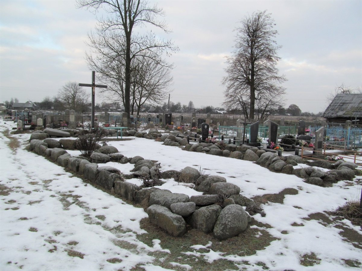 Вынісцы. Могілкі